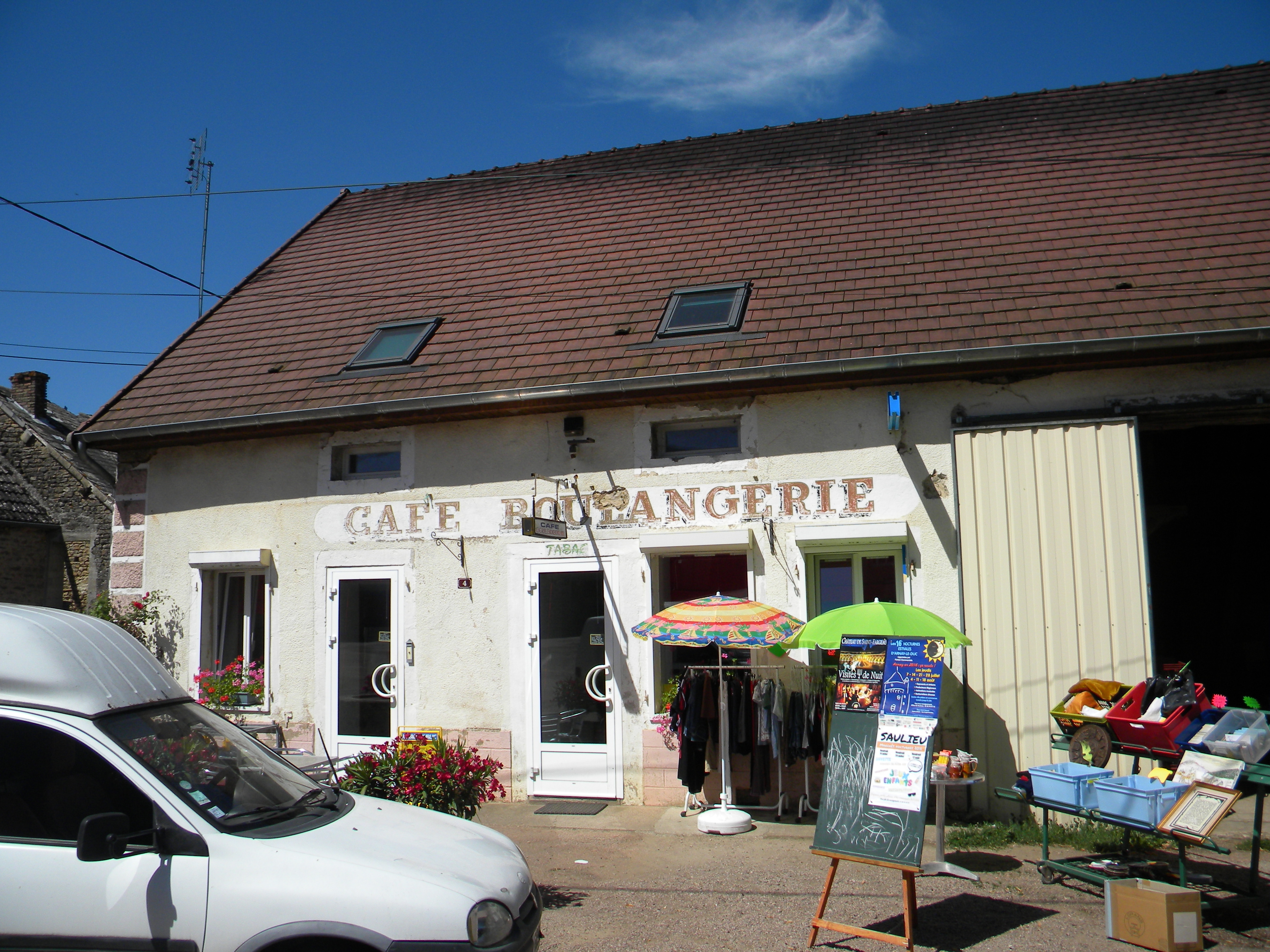 Butiko en Censerey